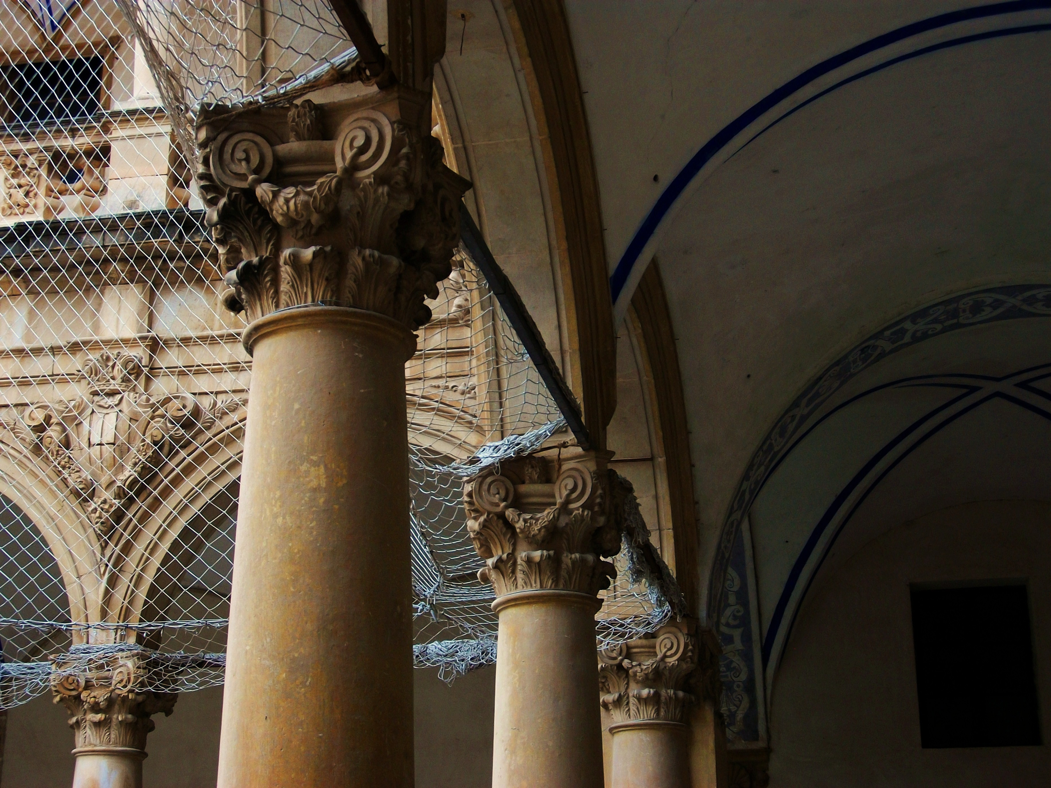 Detall dels capitells del claustre de la Universitat o de les aules del Col·legi de sant Doménec d'Oriola.